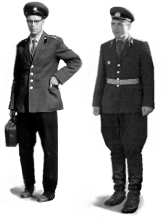 форма 1959-1969